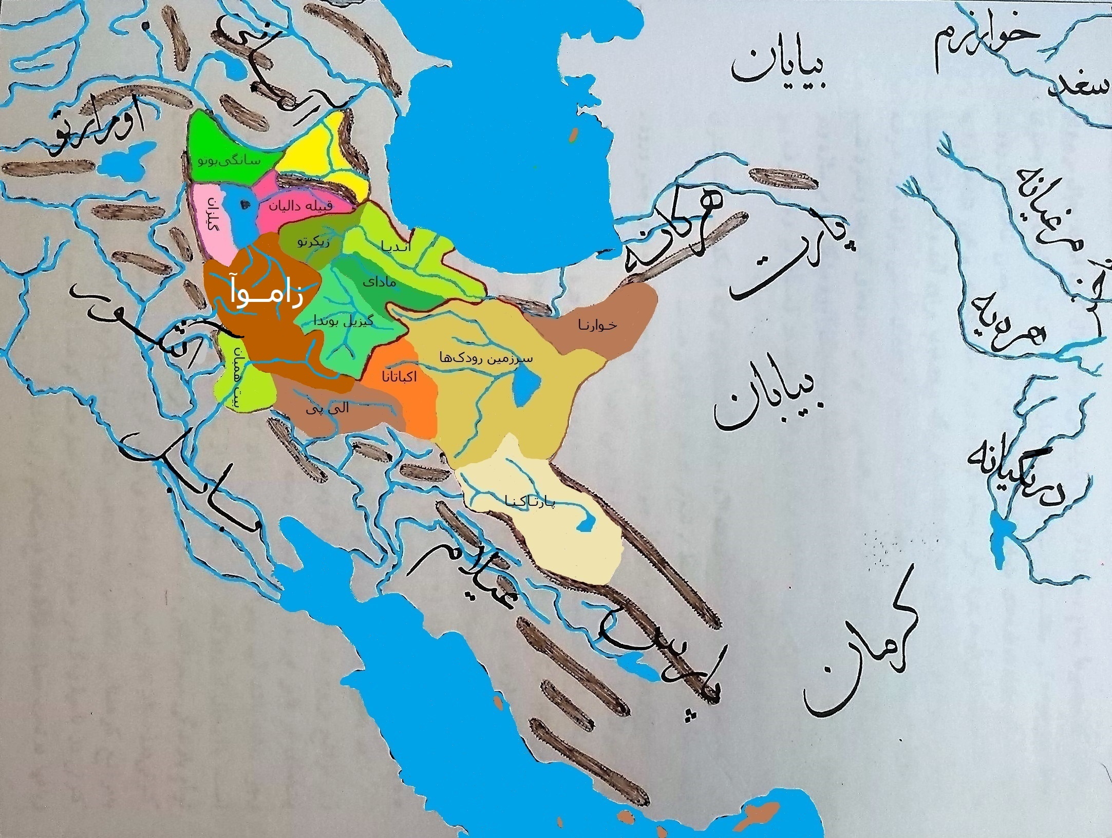 کشور باستانی زاموآ در آغاز قرن نهم پیش از میلاد